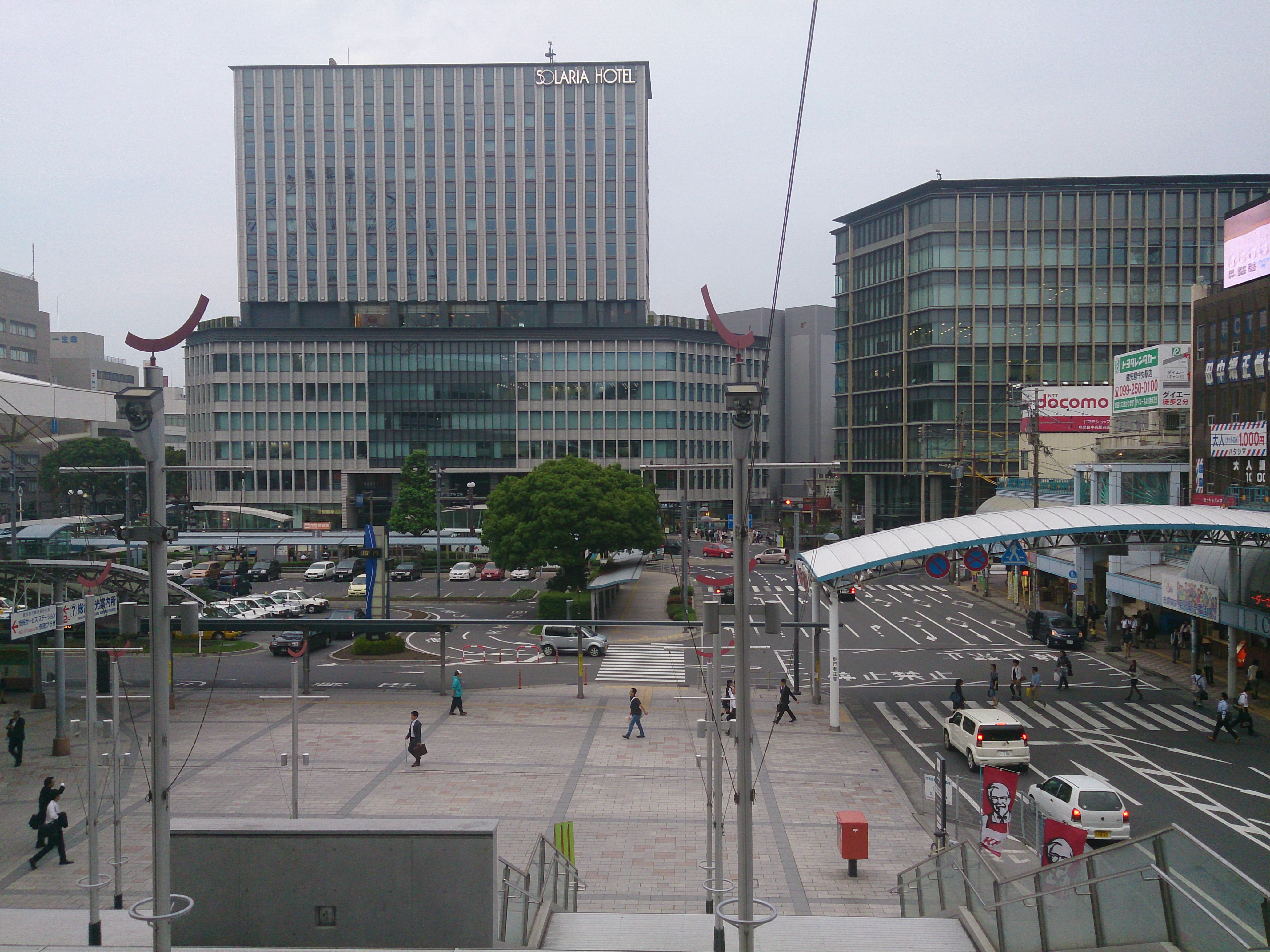 大階段から見た駅前広場